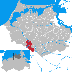 Former Amt Bad Sülze in Mecklenburg-Vorpommern - District Nordvorpommern